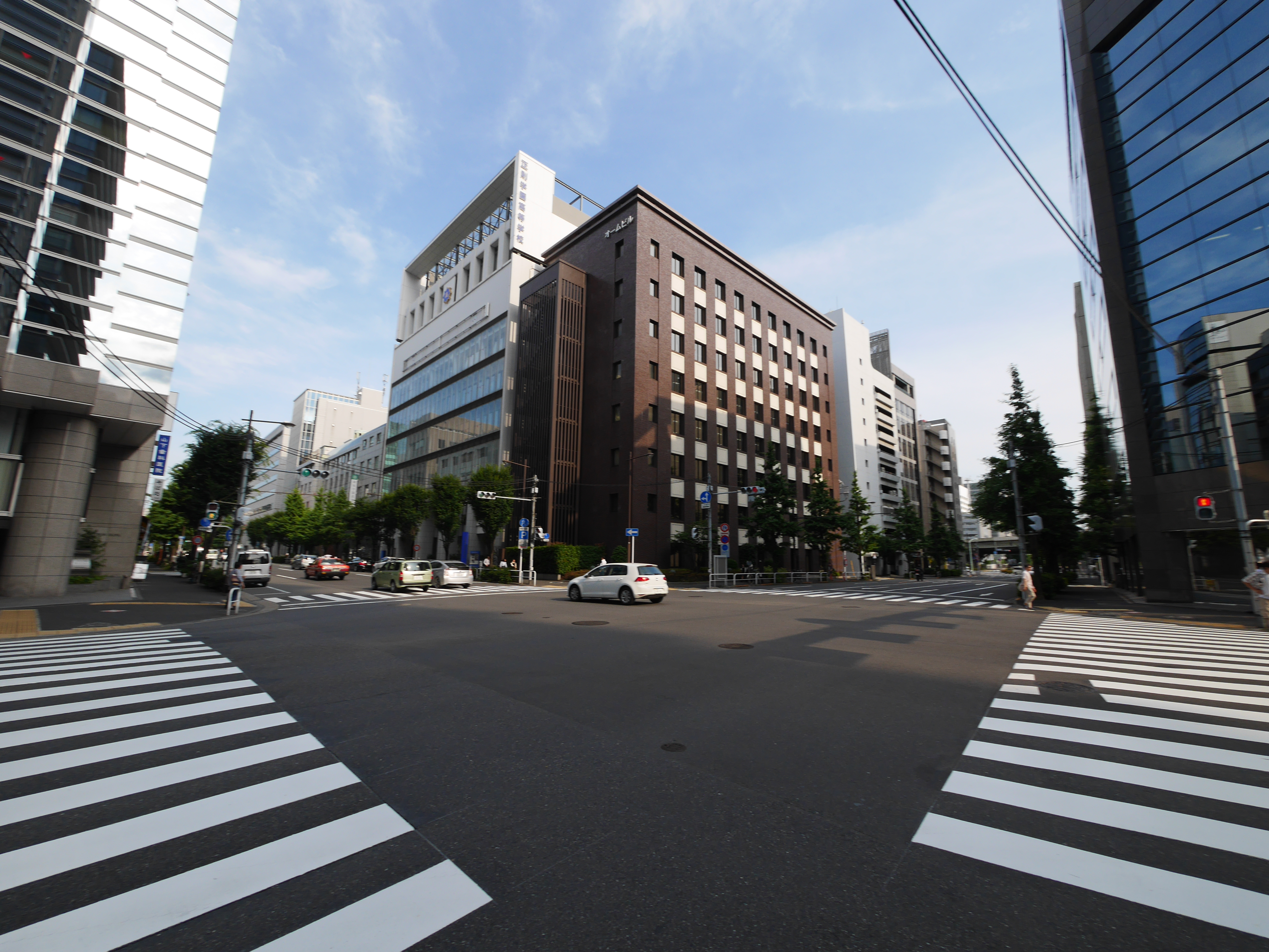 3 Chome Kanda Nishikichō, Chiyoda-ku, Tōkyō-to 101-0054, Japan